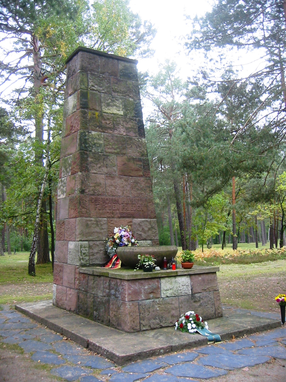 Denkmal auf dem Waldfriedhof Halbe in der Gemeinde Halbe im Landkreis Dahme-Spreewald bei Berlin. Der Friedhof ist mit über 28.000 Opfern eine der größten Kriegsgräberstätten Deutschlands.